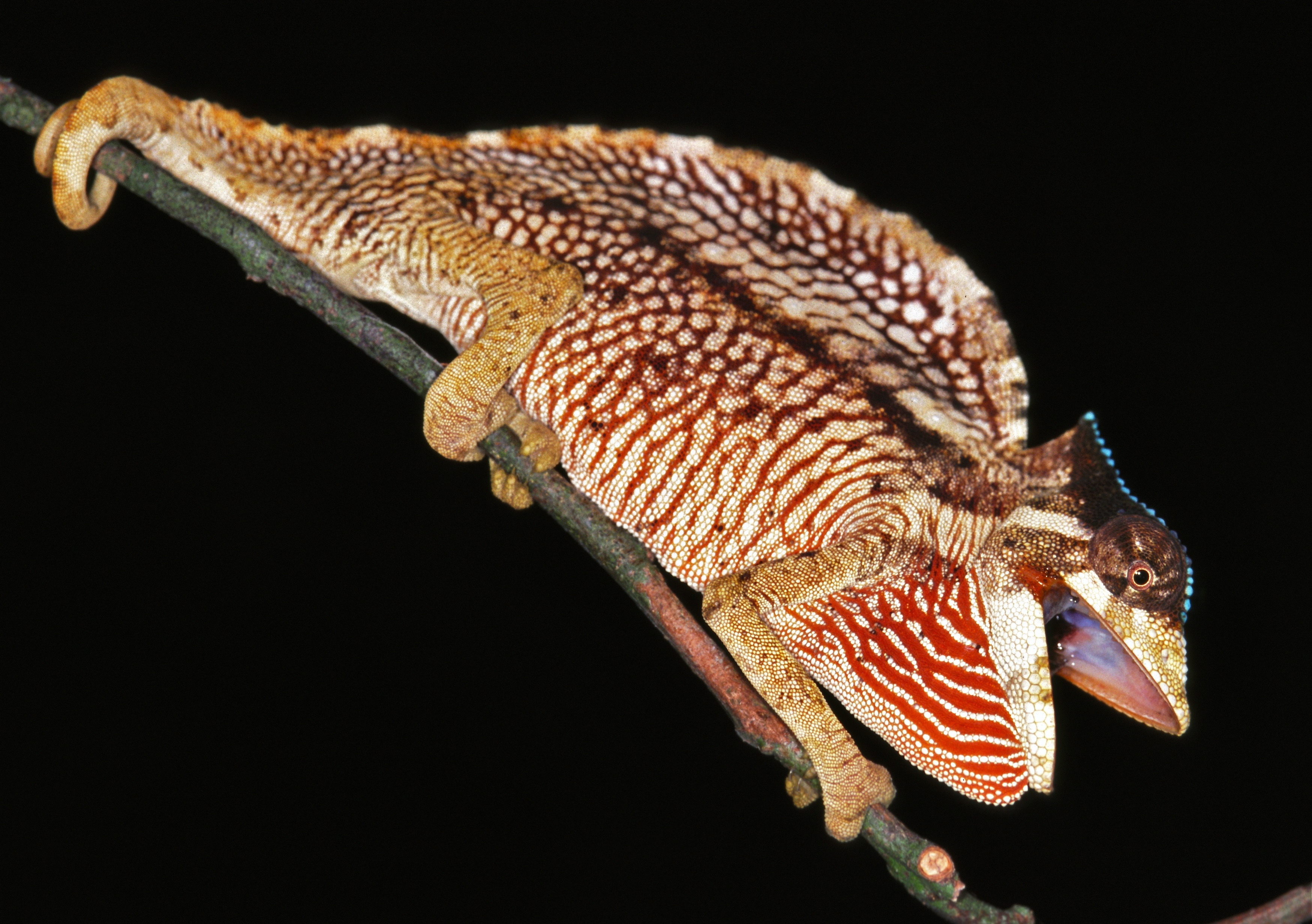 Korup NP, CAMEROON